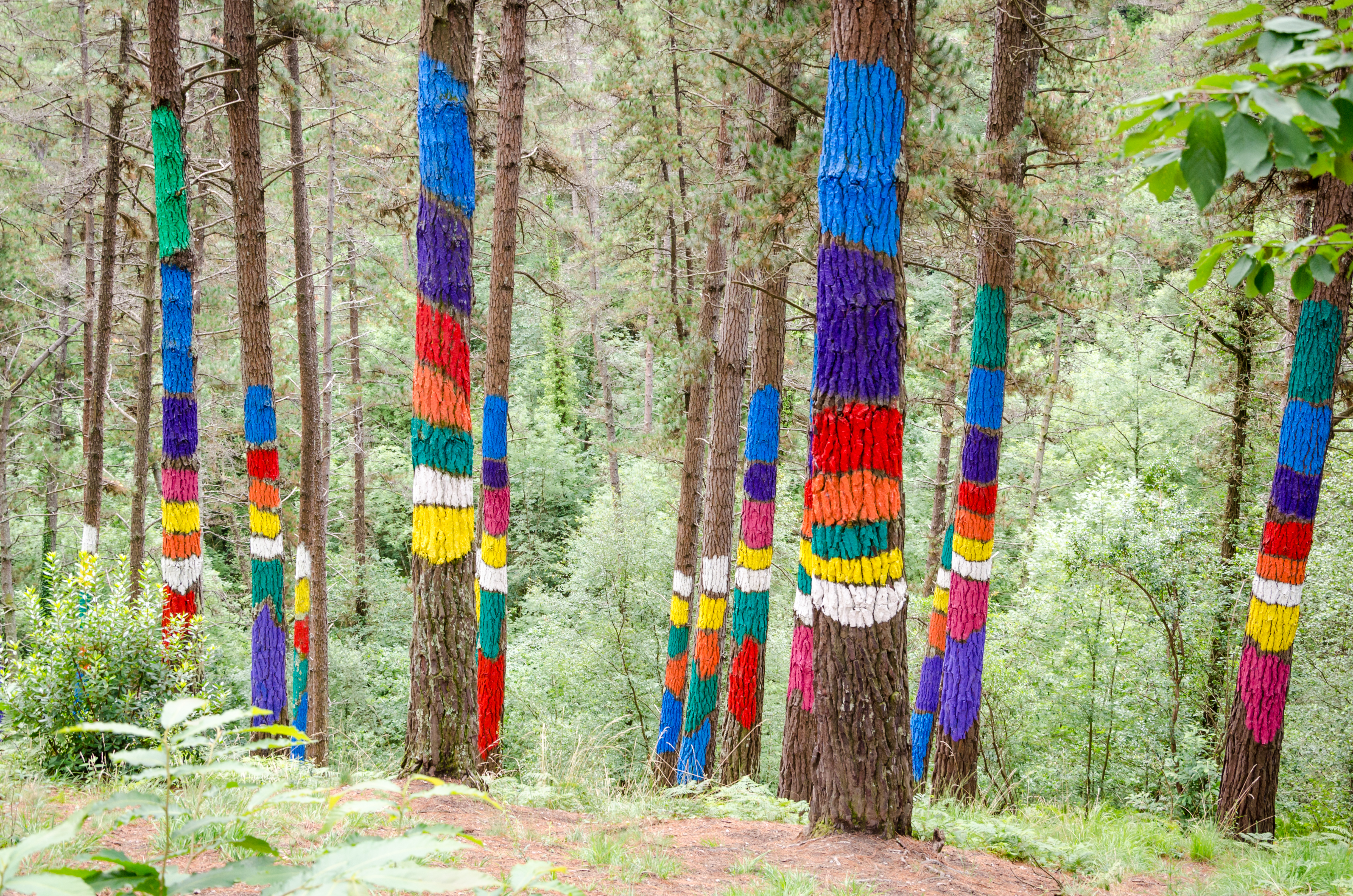 Colores.